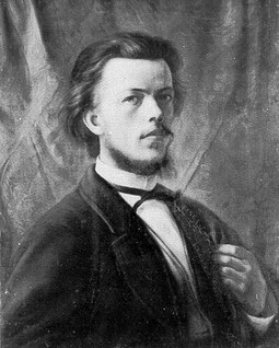 autoportét Antona Roberta Leinwebera (1845-1921)